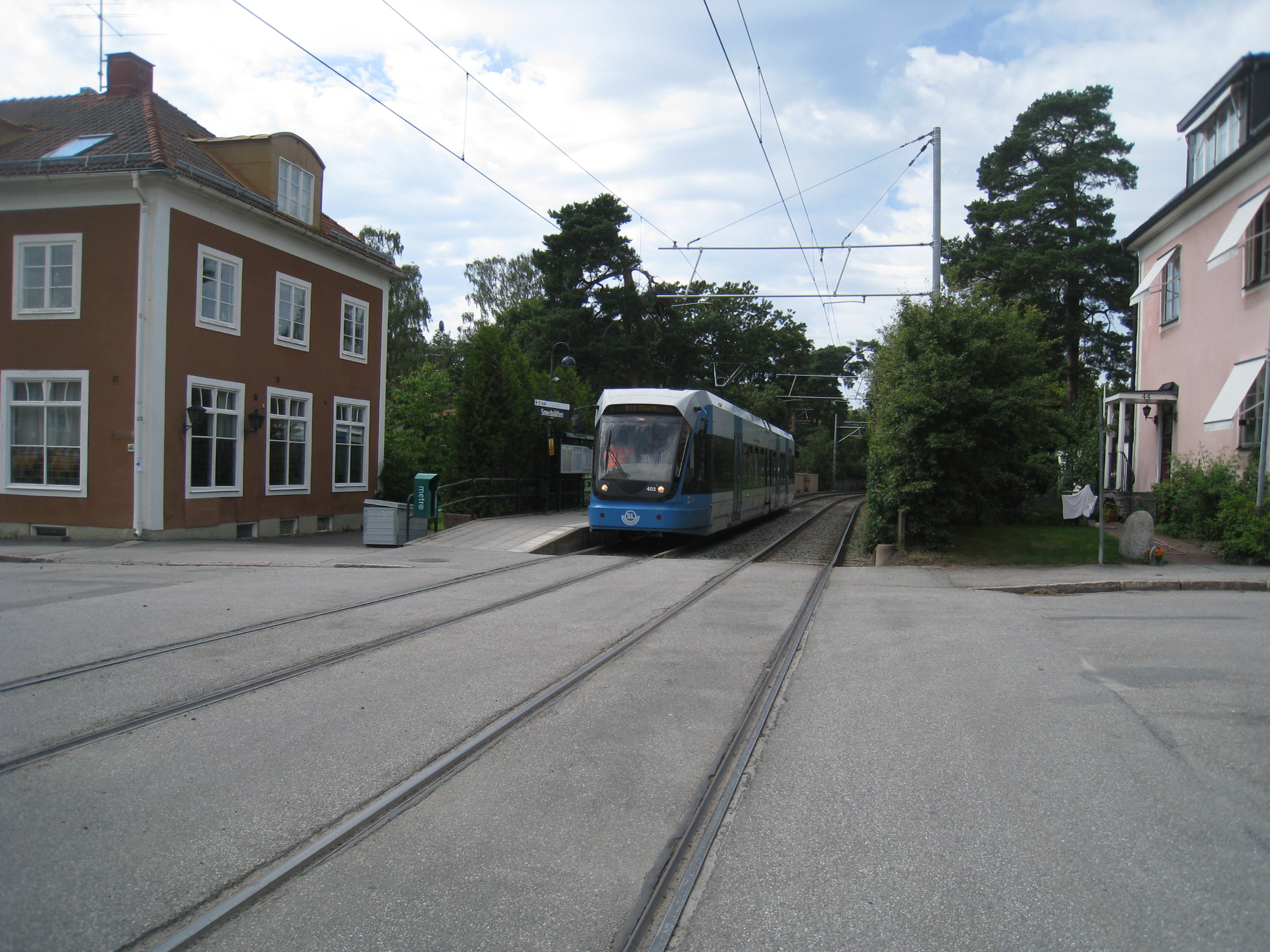 12.ans spårvagn vid Smedslättens hållplats, Bromma